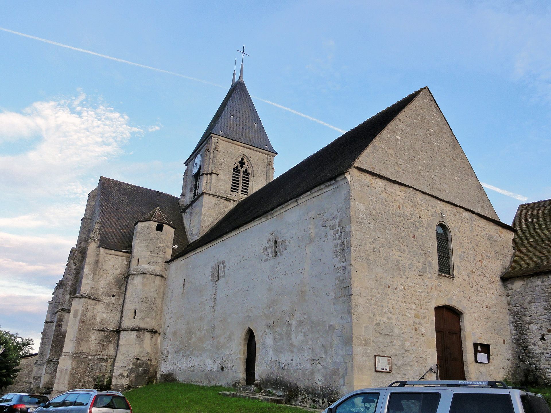 Église Saint-Denis de Chérence, Val-d'Oise, France.